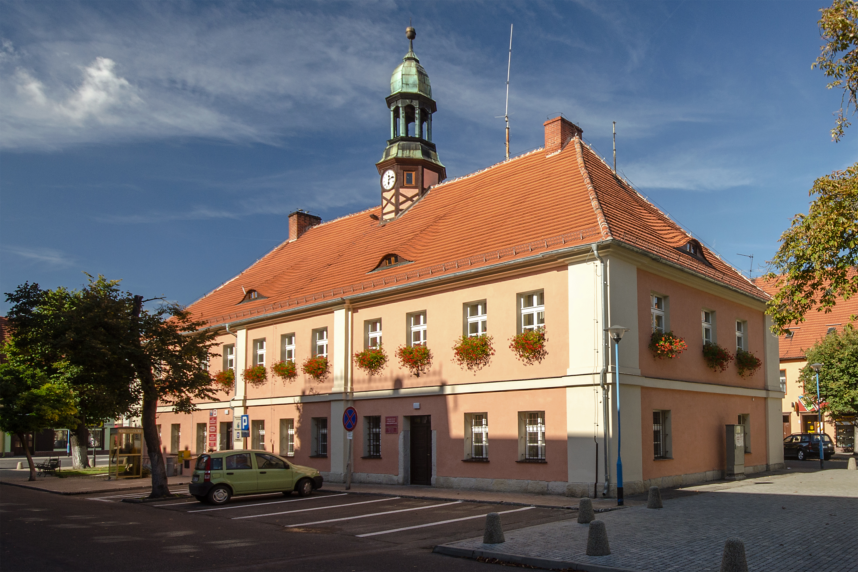 Prochowice, ratusz, kon. XVIII, XX